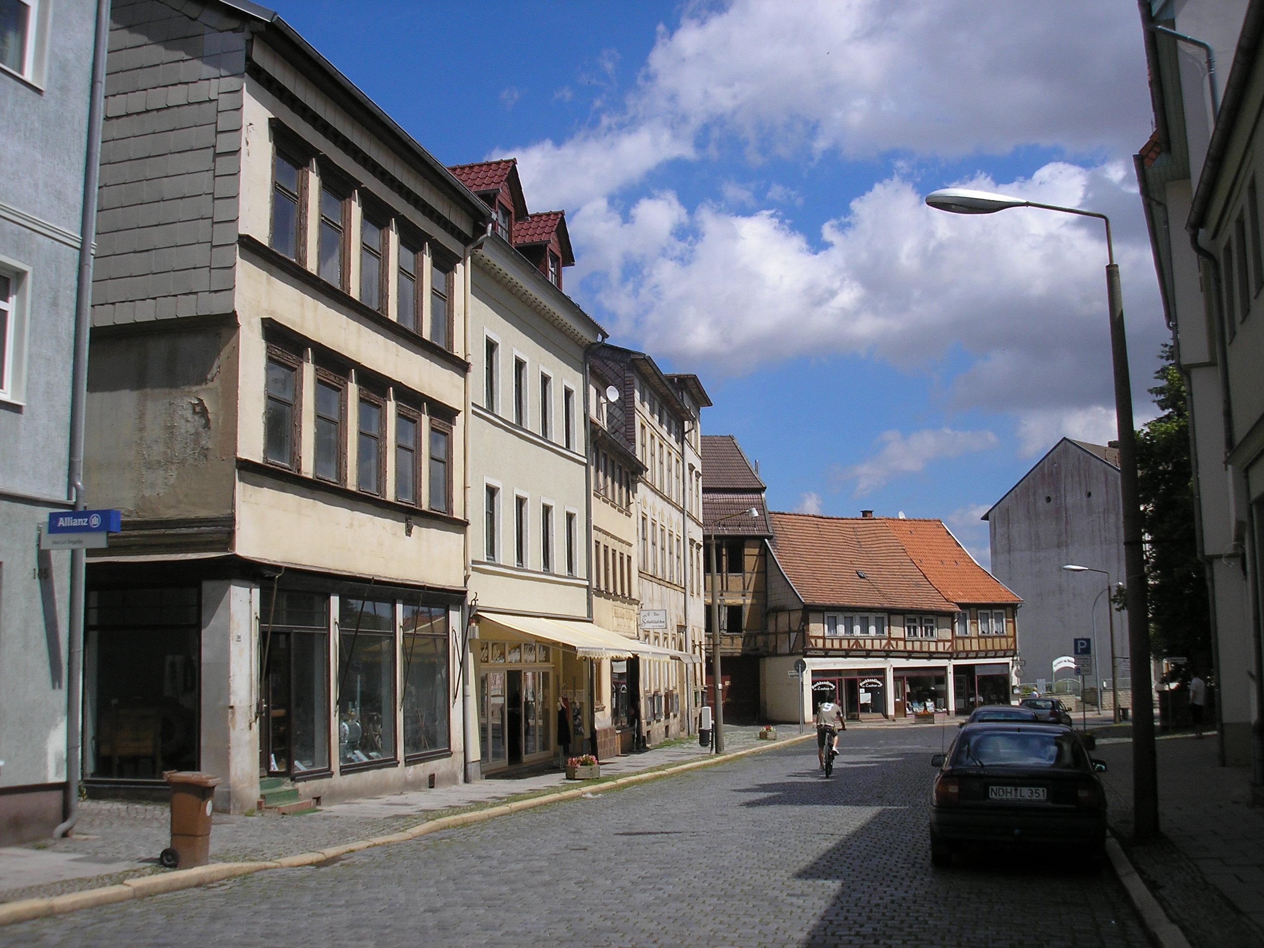 Die Hauptstraße in Bleicherode (Thüringen)